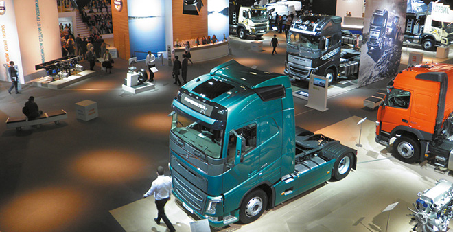 Международный грузовой автосалон COMTRANS'15, сентябрь 2015 года, г. Москва